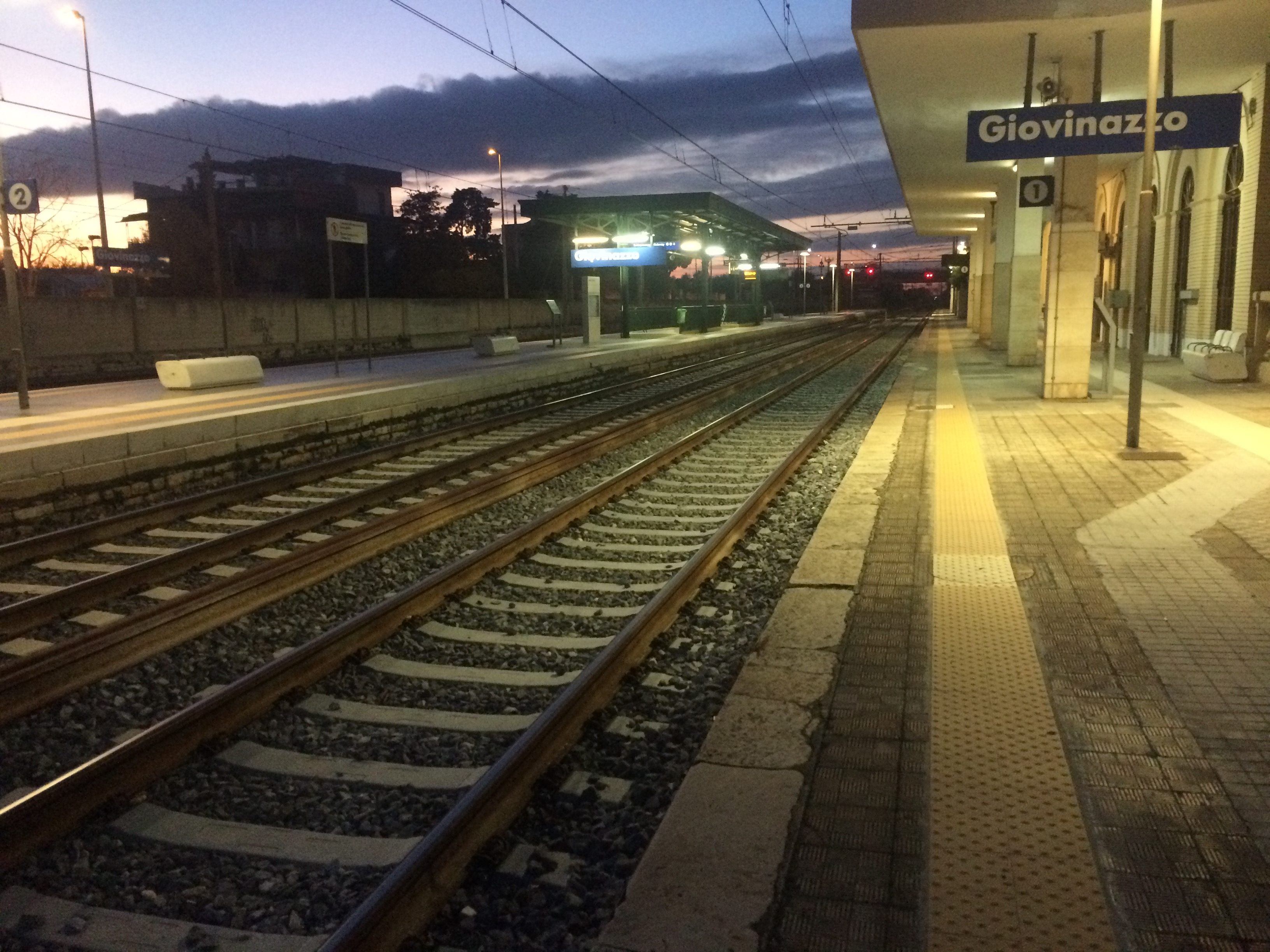 Stazione di Giovinazzo guardando verso nord